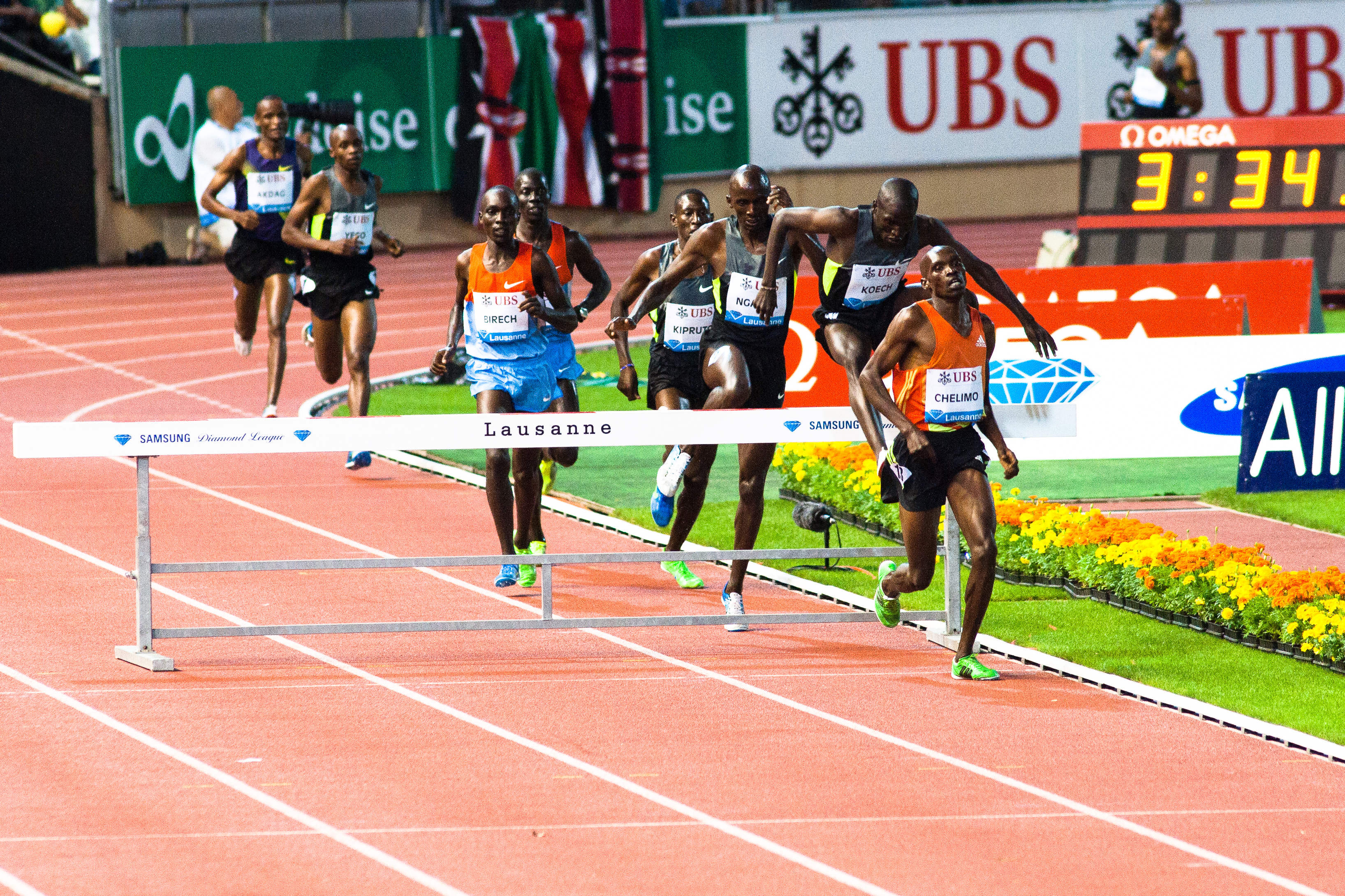 Athletissima 2012 - 3000 m steeple. Jairus Kipchoge Birech, Conselus Kipruto, Bernard Nganga, Paul Kipsiele Koech, Elijah Chelimo Kipterege